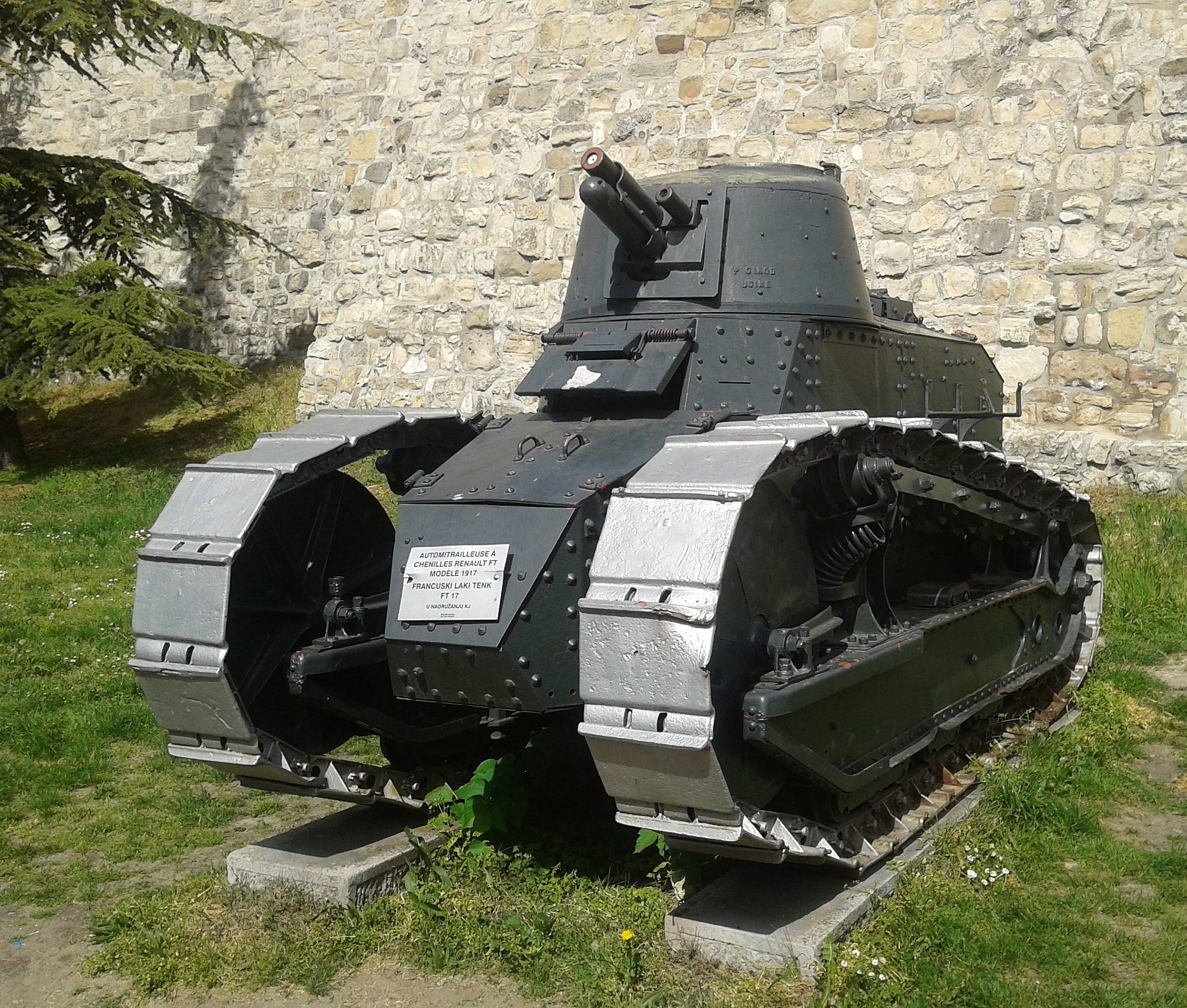 Panzer (Renault FT-17 Modell 1917) in der frei zugänglichen äußeren Ausstellung des Militärmuseums Belgrad (Serbien)